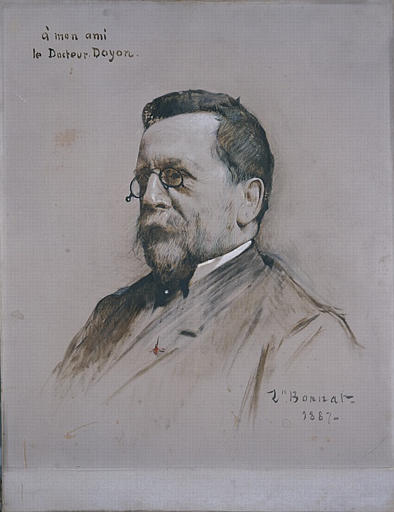 Portrait du docteur Adrien Doyon (1827-1907)